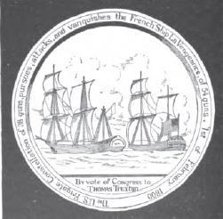 中文（中国大陆）: 美国托马斯·特鲁克斯顿海军准将因在美法短暂冲突期间对战法国复仇号巡防舰获国会金质奖章，奖章背面所刻正是海战场景。